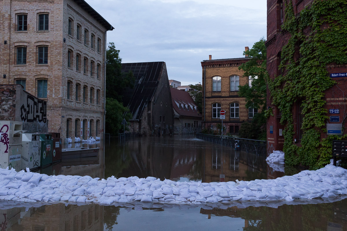 Aufgenommen am 3. Juni 2013 Halle/Saale, Halle, ST, Deutschland